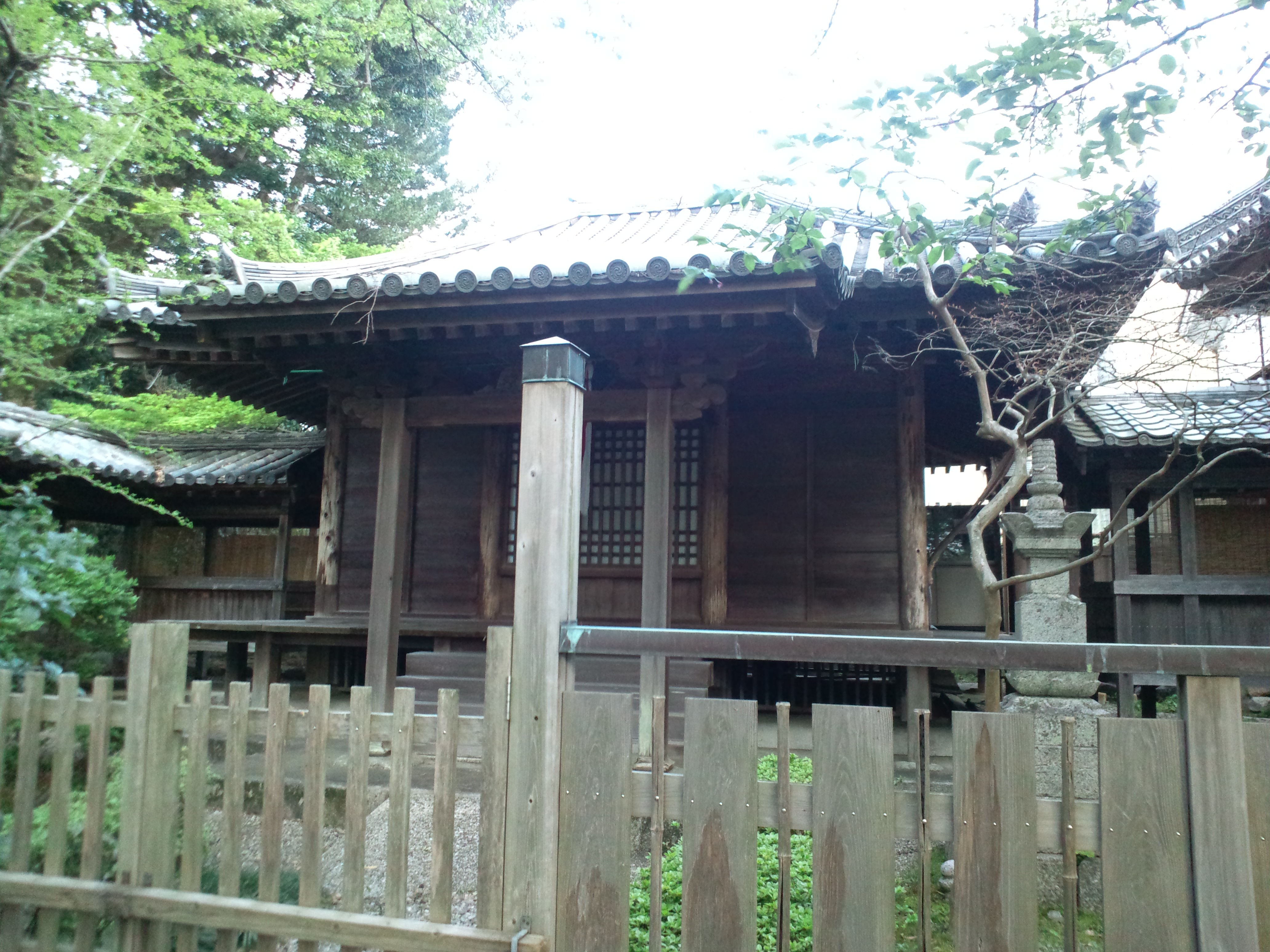 地蔵院（関の地蔵） 愛染堂